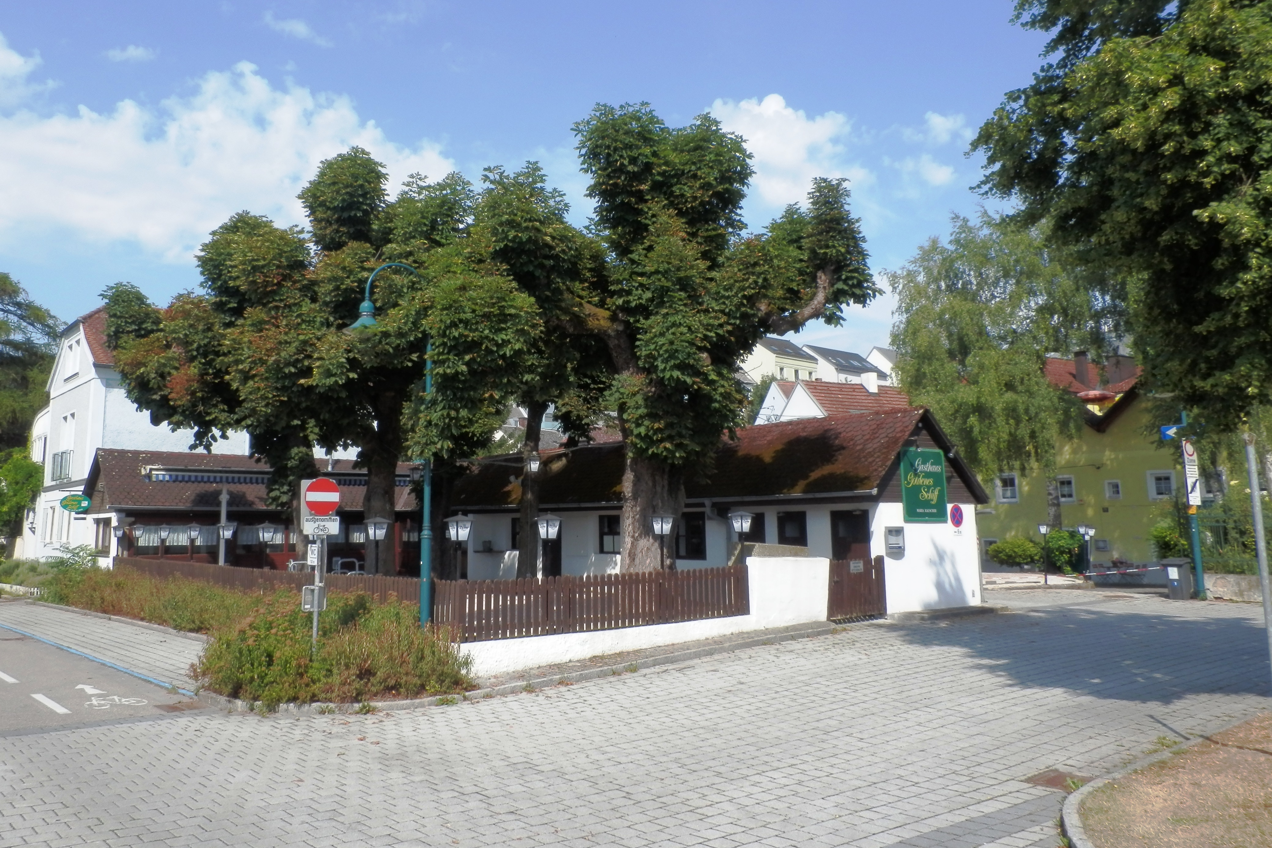 Gasthaus Goldenes Schiff (Rauscher), Linz, Alt-Urfahr